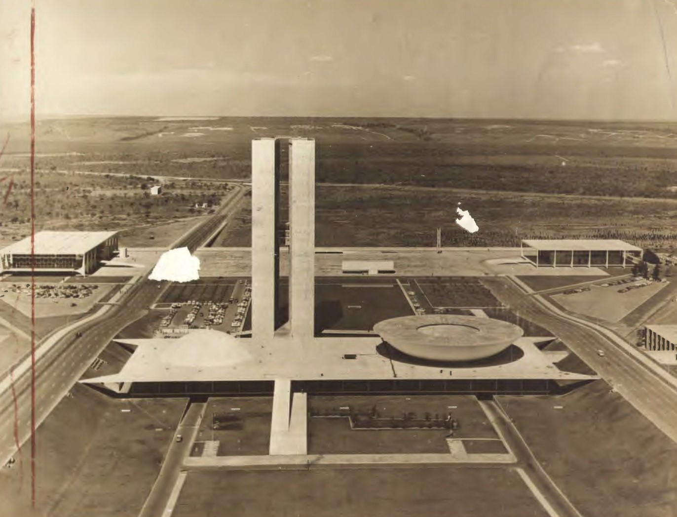 Fotografia do Fundo Correio da Manhã, sob a guarda do Arquivo Nacional.